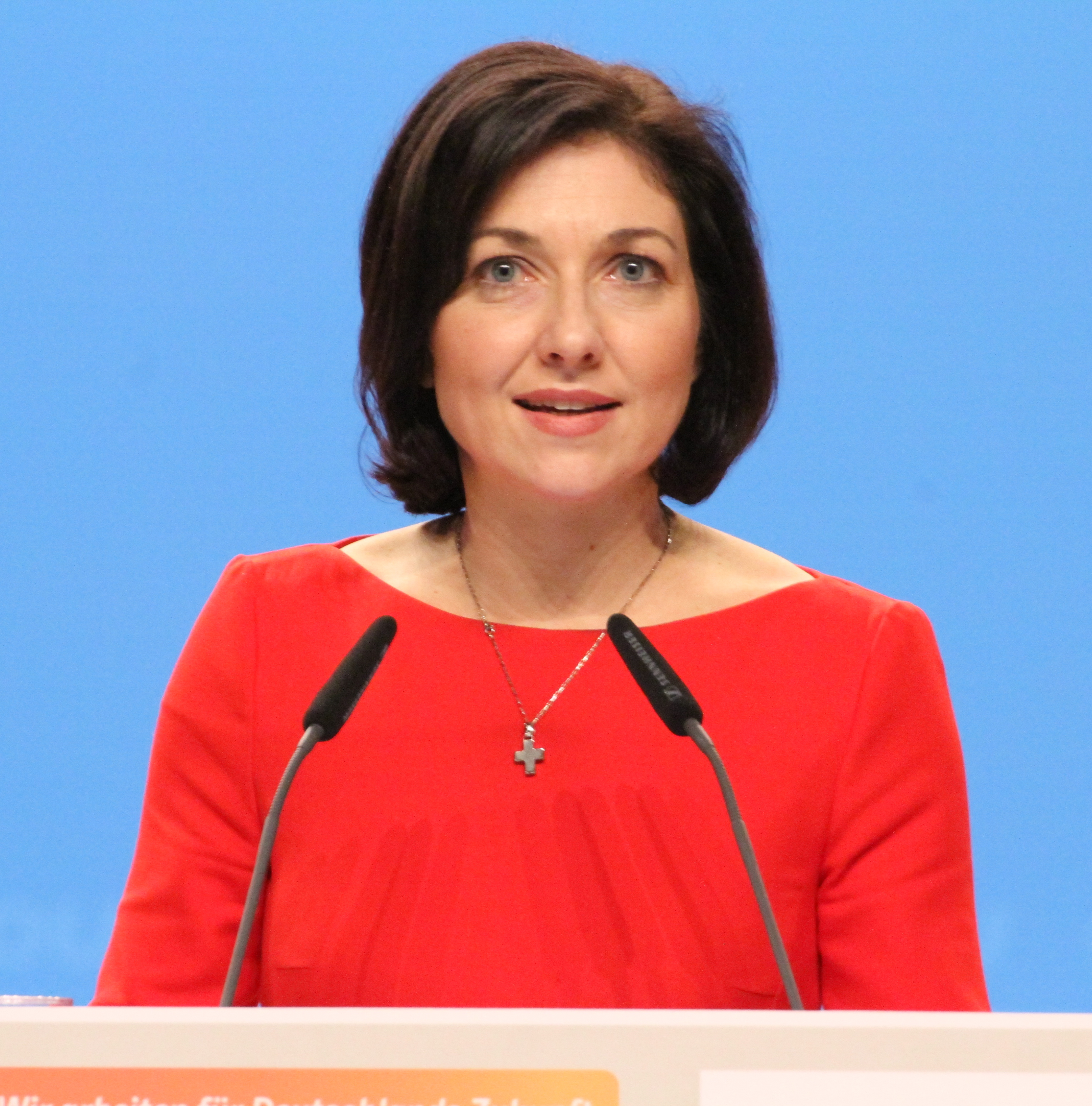 Katherina Reiche auf dem CDU Bundesparteitag Dezember 2014 in Köln